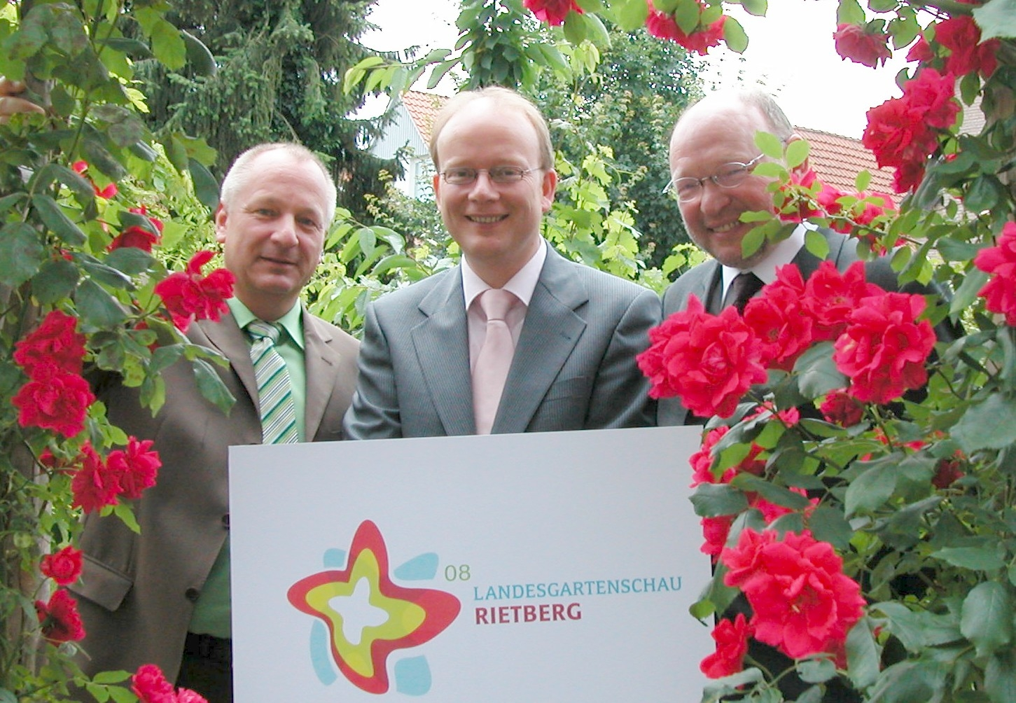 v.l. Hauptgeschäftsführer Peter Milsch, Bürgermeister und Aufsichtsratsvorsitzender André Kuper und Geschäftsführer Heinrich Sperling präsentieren das Logo der Landesgartenschaustadt Rietberg 2008